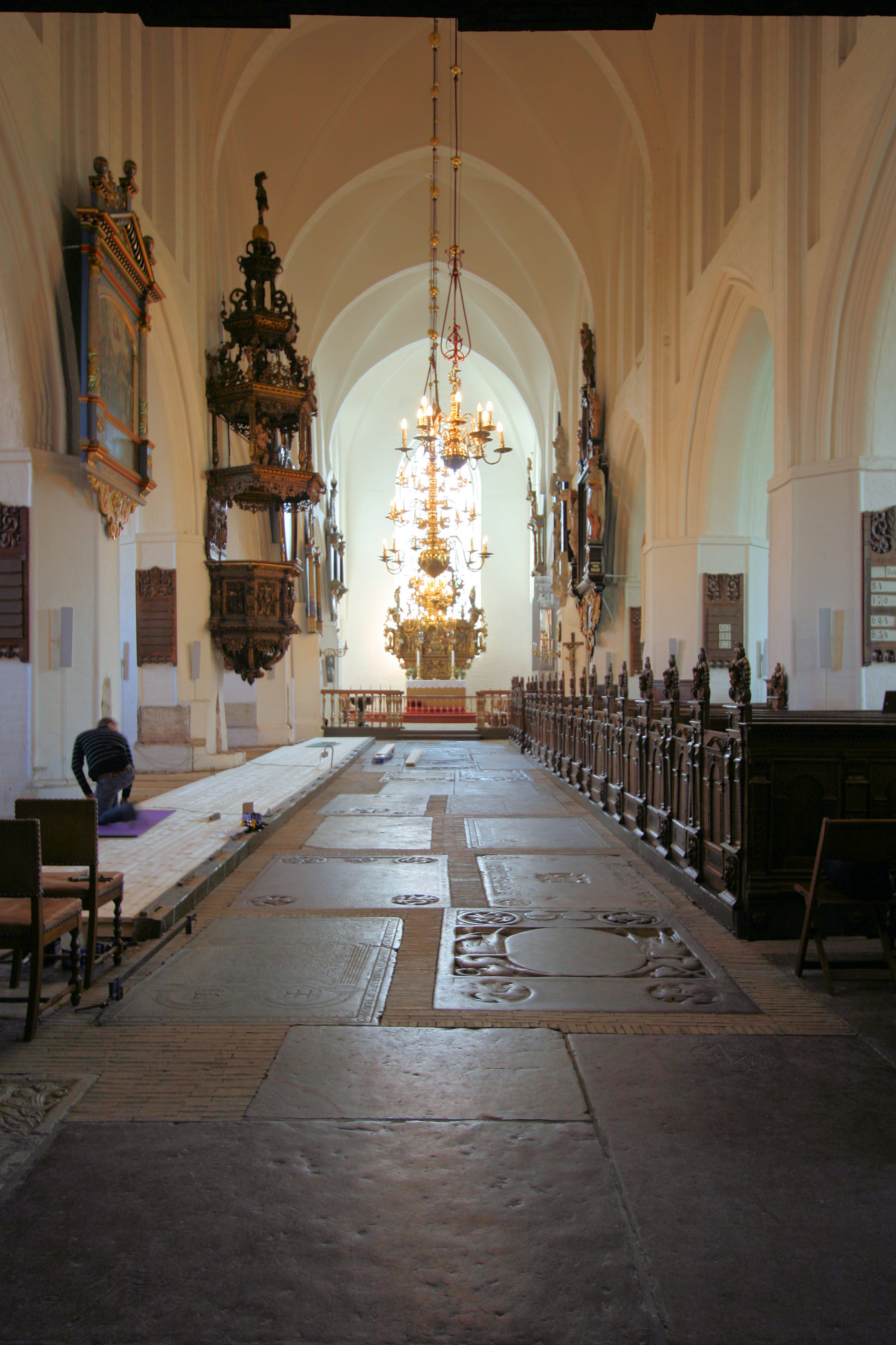 Sankt Nicolai Kirke, Køge, Denmark (Køge Kirke). Interior. Portrait format.